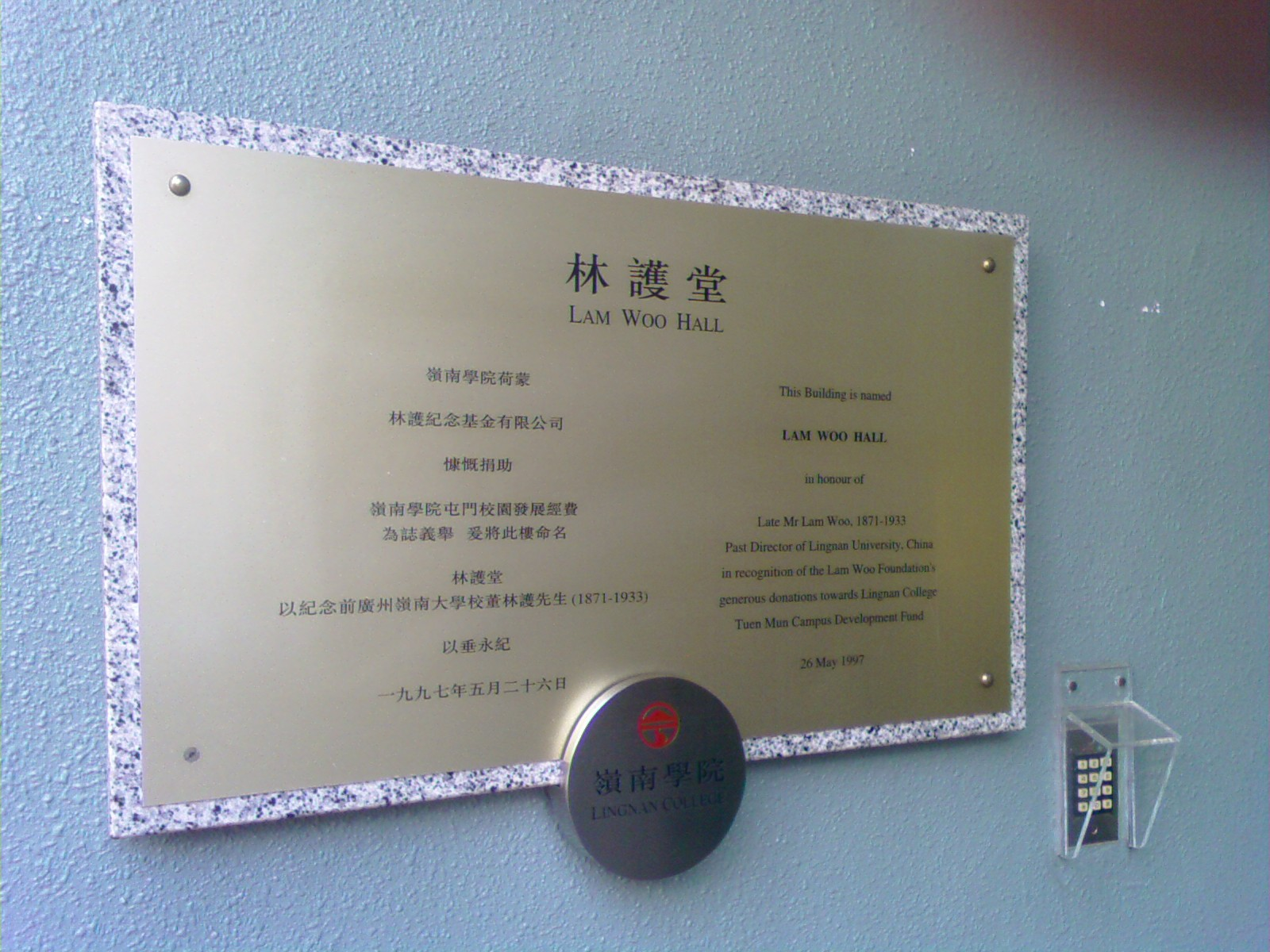 林護堂